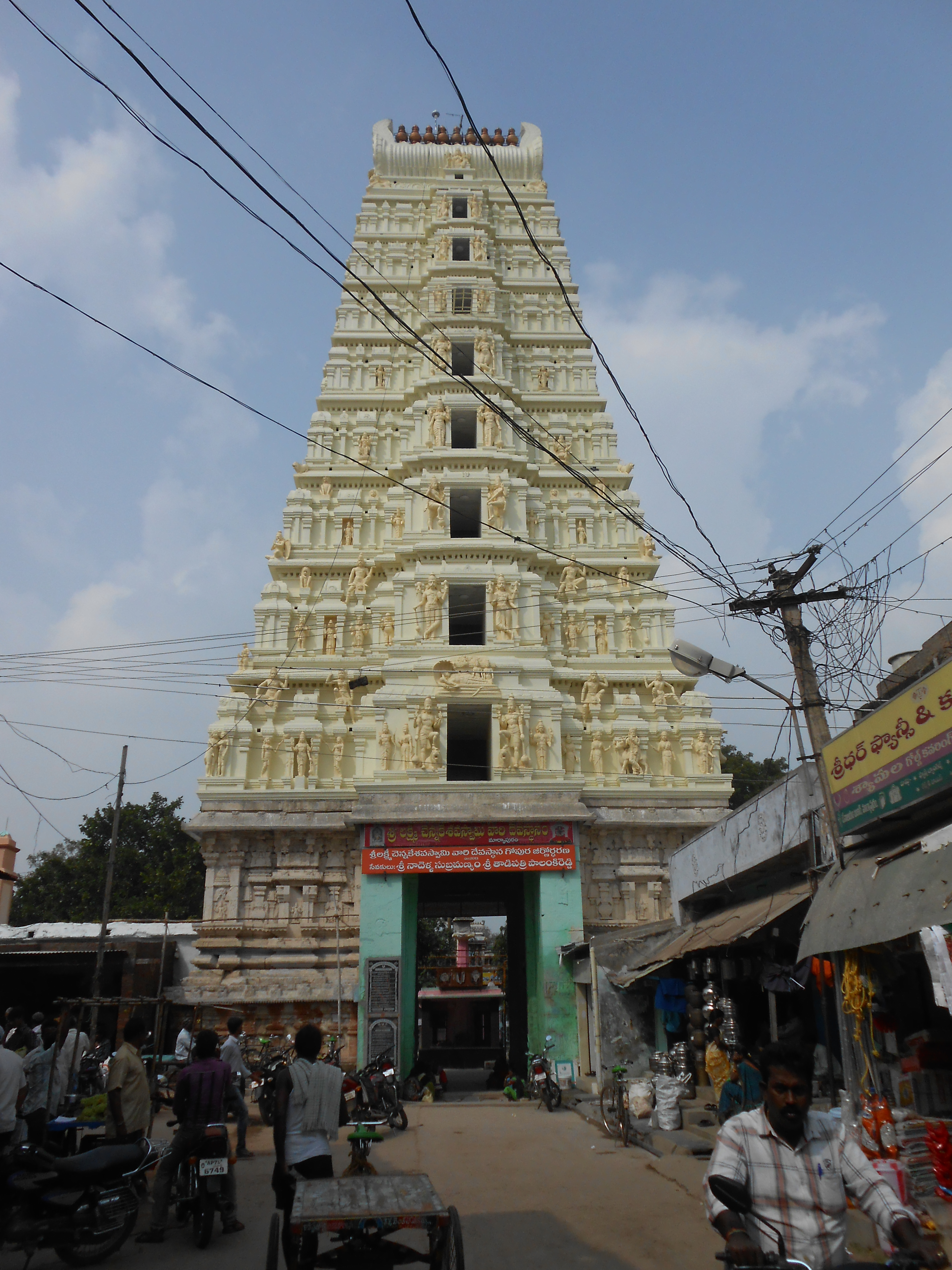 prakasam district markapuram lakshmichennakesava swami temple mukadwaram